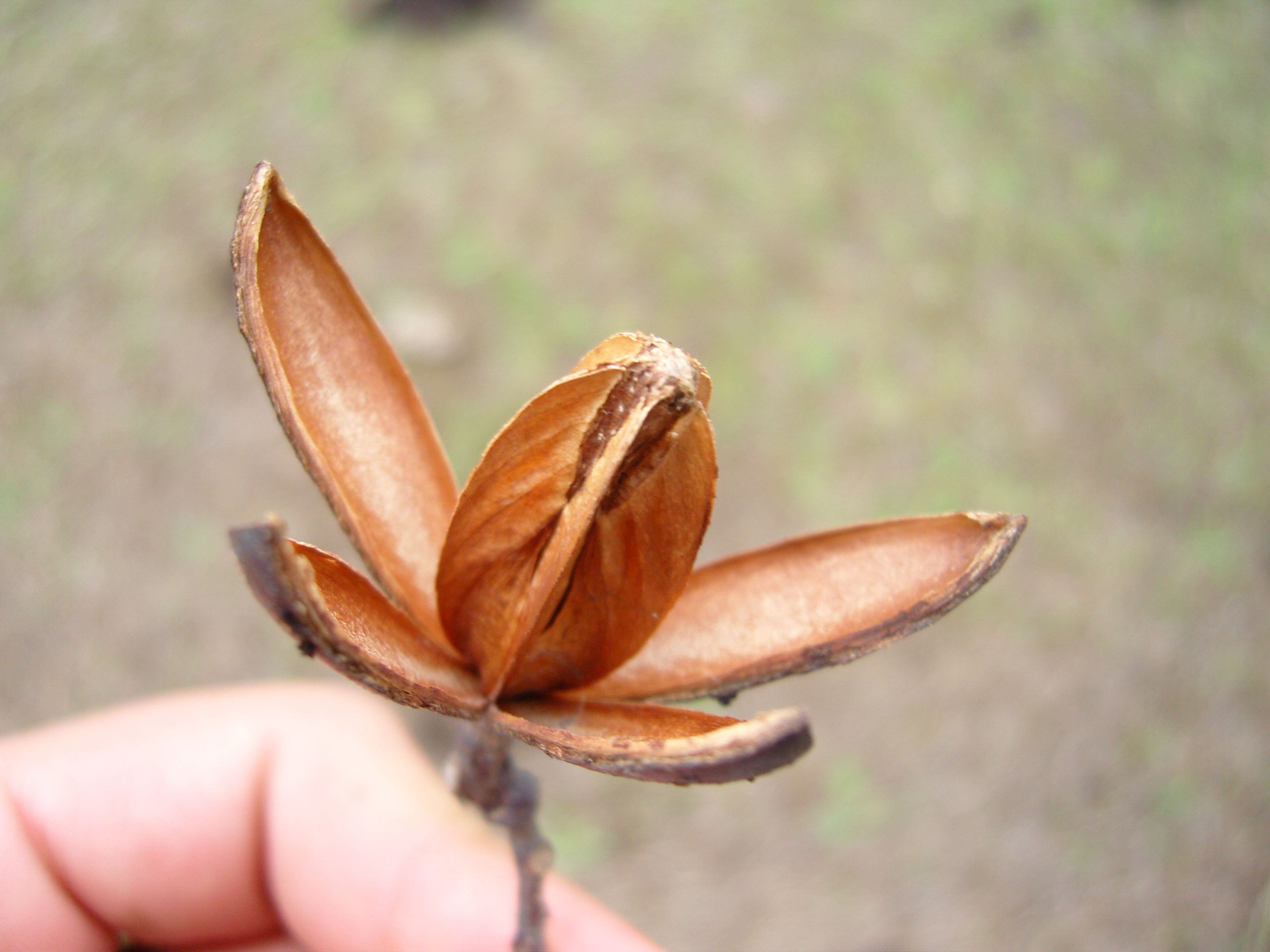 Fruto del cedrela odorata, ya abierto, sin las semillas.